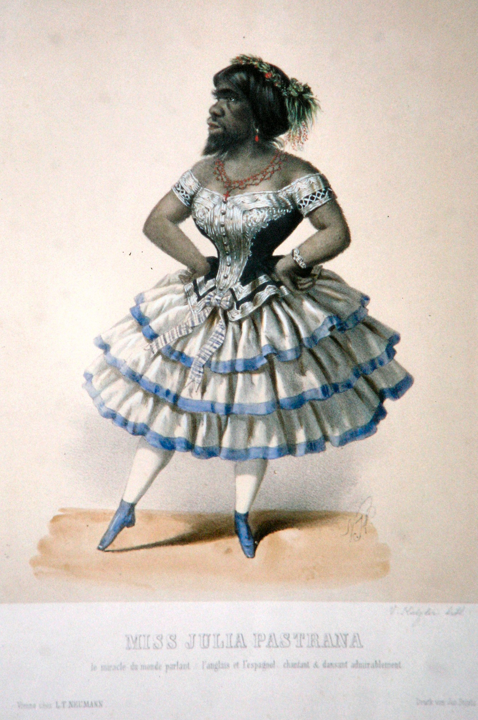 Julia Pastrana, Lithographie von Vinzenz Katzler (+ vor 1900)